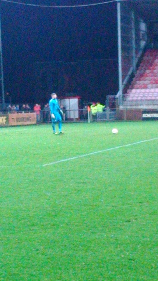 Peter van der Vlag tijdens FC Emmen - jong Ajax.